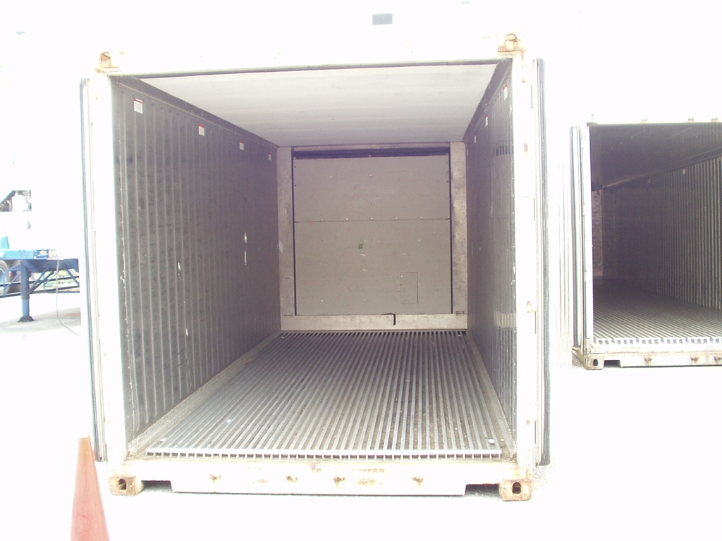 関連資料画像。